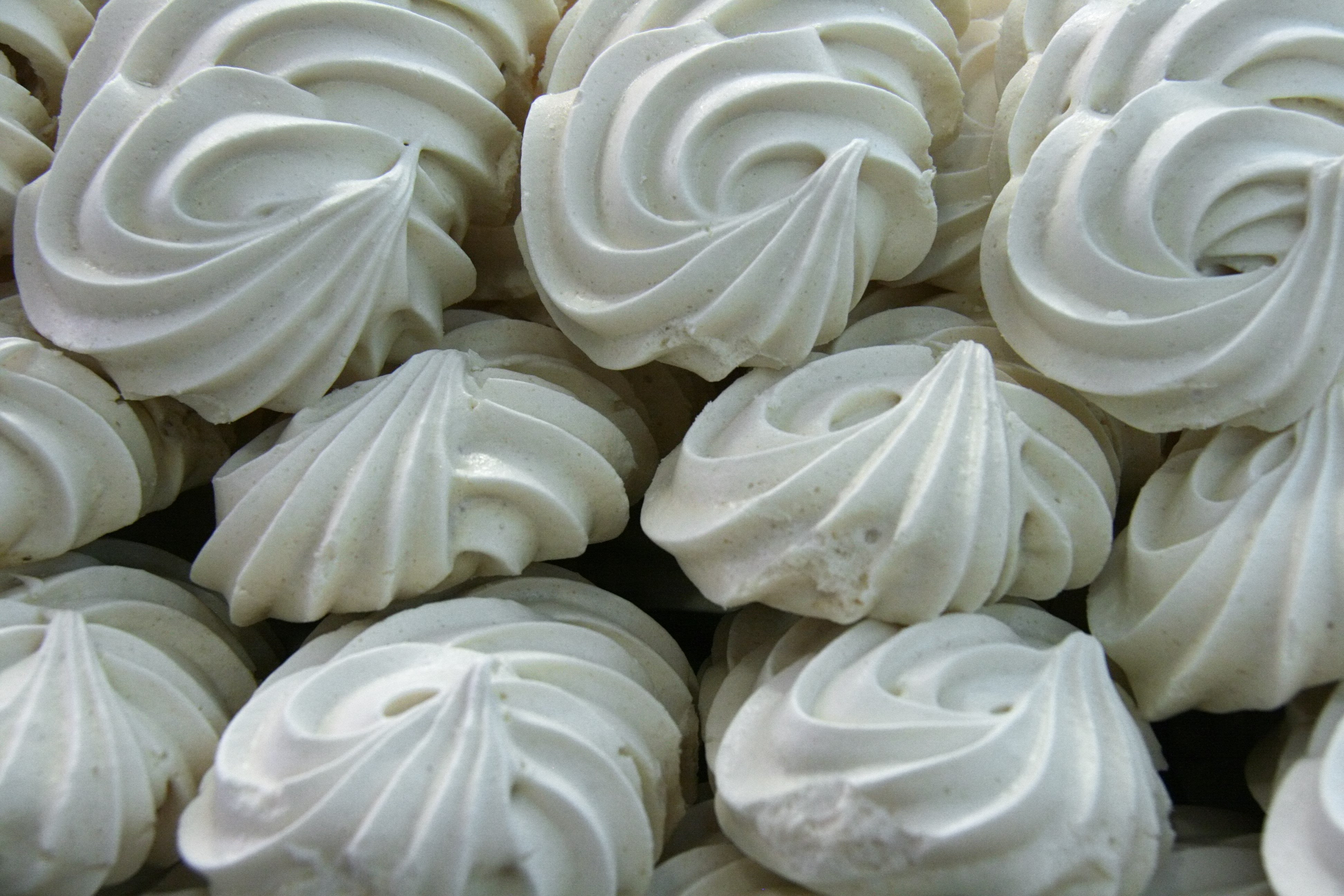 Merengues